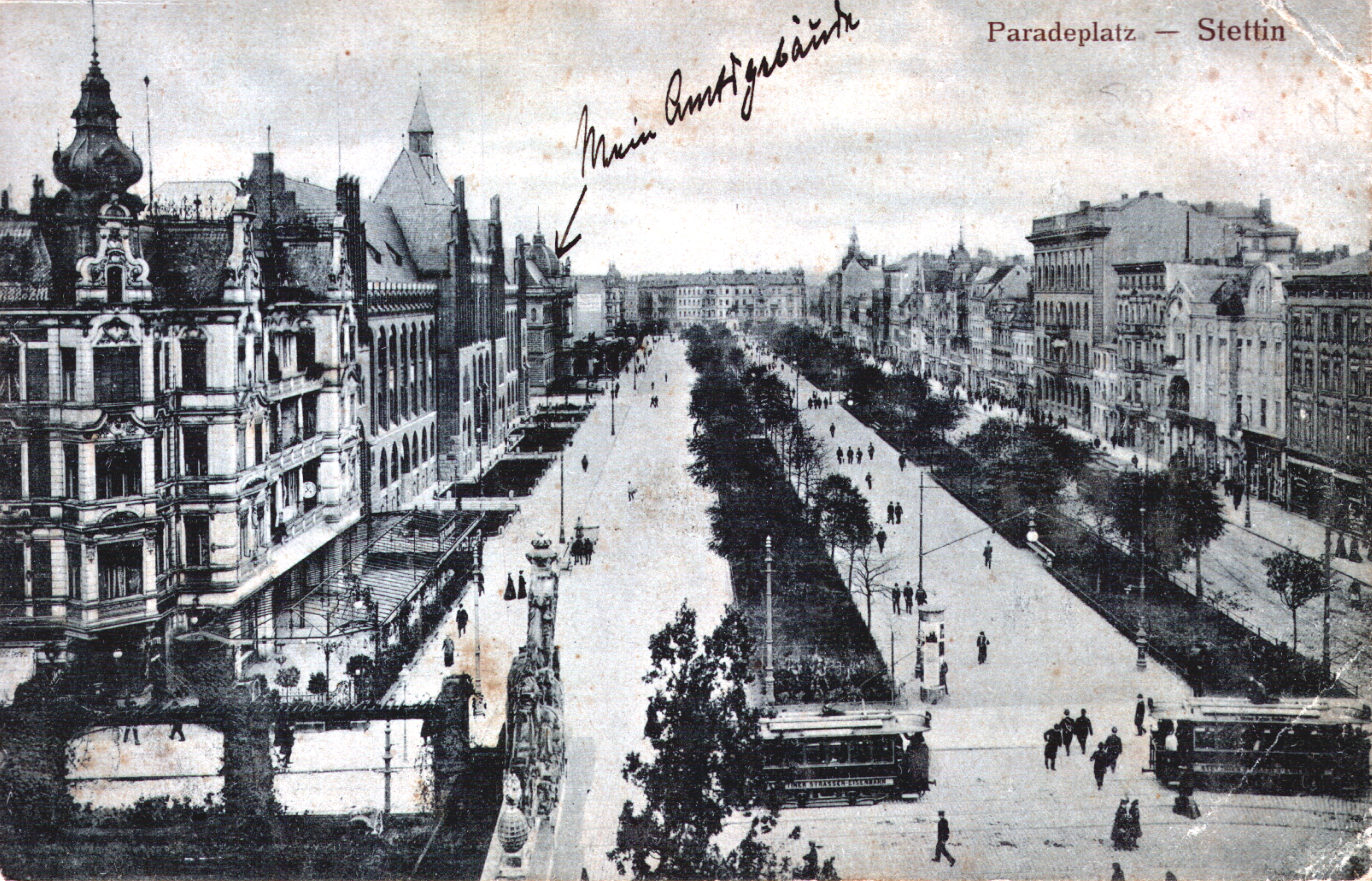 Szczecin na starej fotografii